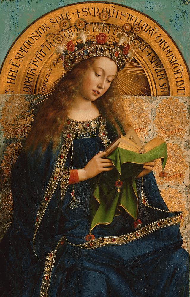 retable de l'Agneau mystique detail